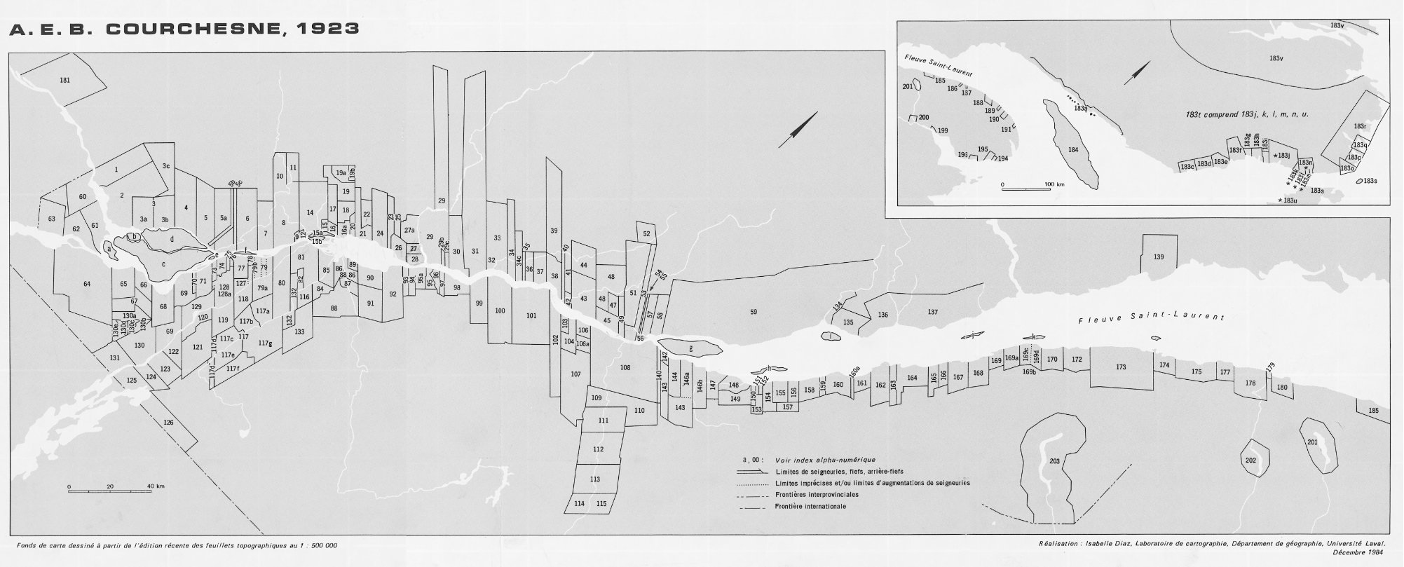 Carte des seigneurie du Bas-Canada